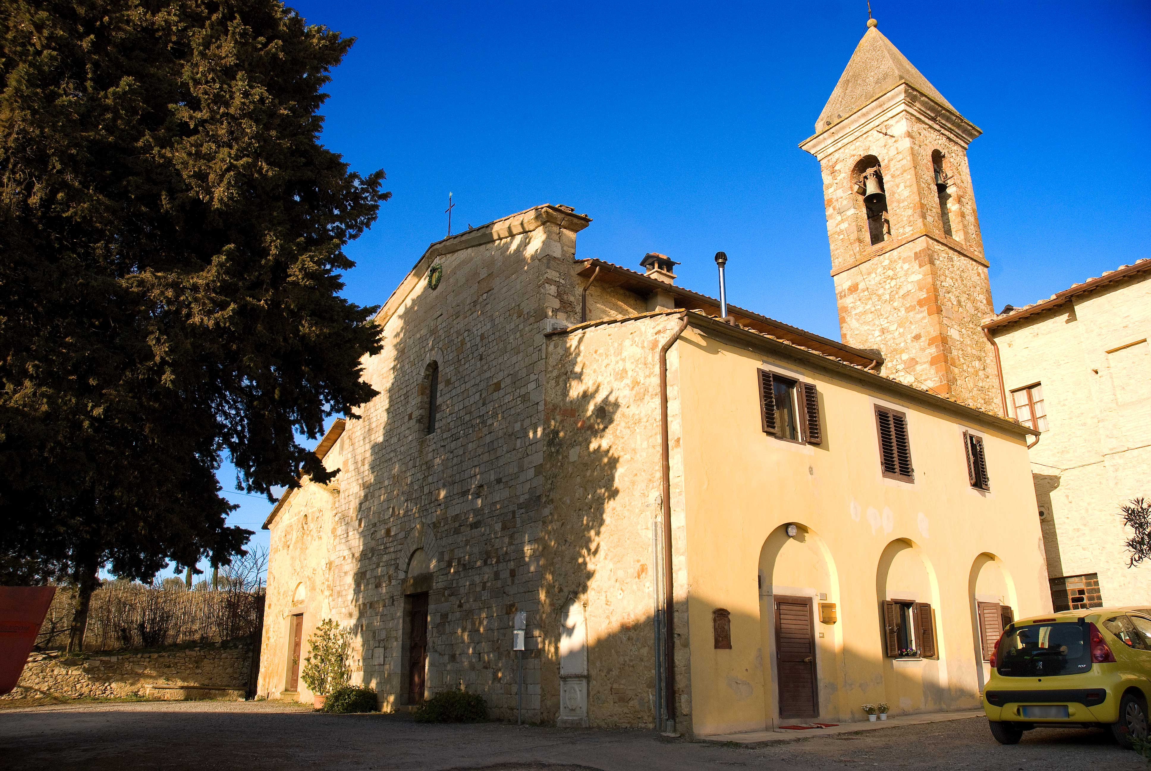 pieve di santa cristina a ligliano (Castellina in chianti)